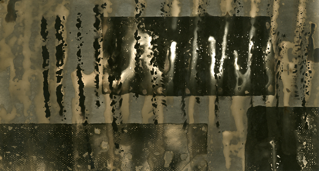 Serie fotografica : Italia, 1960 / Paolo Monti. - Stampe: 2 : Chimigramma, gelatina bromuro d'argento/ carta, 24x30. - ((Sul coperchio della scatola iscrizione didascalica manoscritta a pennarello nero: "8CH".